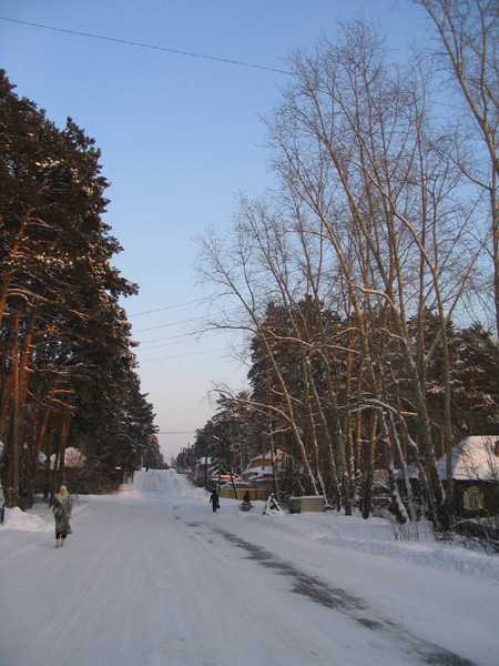 Timiryazevskoye, Tomsk